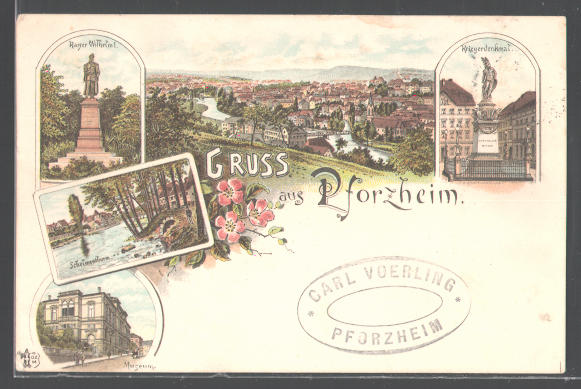 Lithographie auf einer Ansichtskarte aus Pforzheim. Zu sehen sind Schelmenturm, das am 18. Mai 1879 eingeweihte Kriegerdenkmal, Museum und Kaiser-Wilhelm-Denkmal. Die Karte ist 1897 gelaufen.